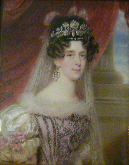 Bildnis der Erzherzogin Maria Dorothea (geb. Prinzessin von Württemberg) im ungarischen Krönungskleidtitle QS:P1476,de:"Bildnis der Erzherzogin Maria Dorothea (geb. Prinzessin von Württemberg) im ungarischen Krönungskleid" label QS:Lde,"Bildnis der Erzherzogin Maria Dorothea (geb. Prinzessin von Württemberg) im ungarischen Krönungskleid"